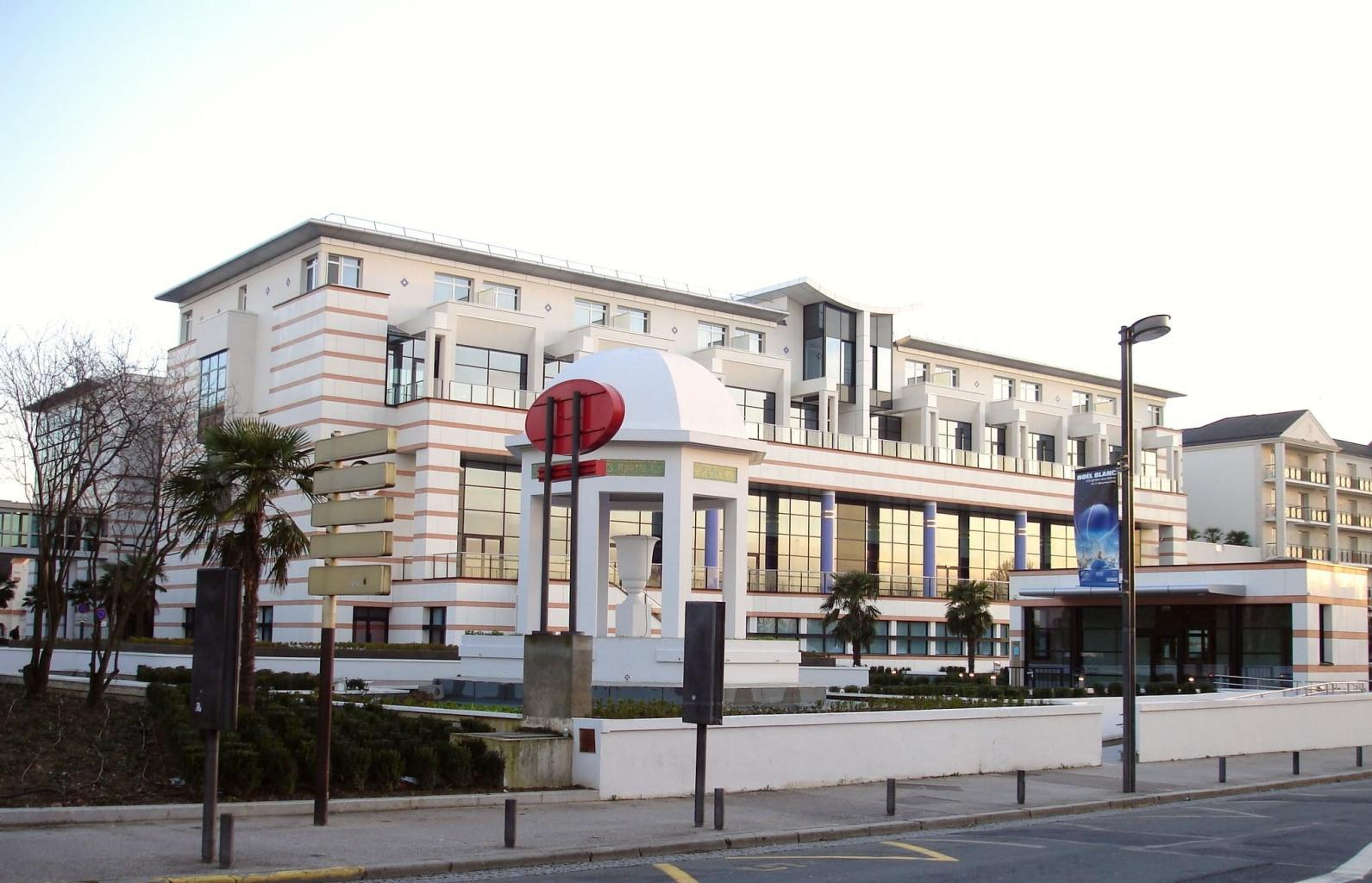 Les thermes - Enghien-les-Bains (France)